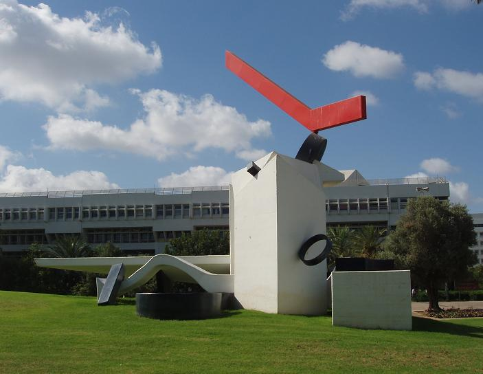 Sculpture